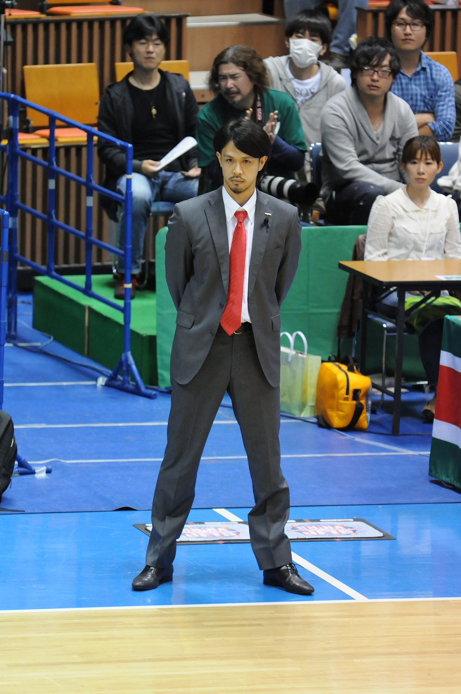 千葉ジェッツ、佐藤博紀HC代行。国立代々木競技場第二体育館で。